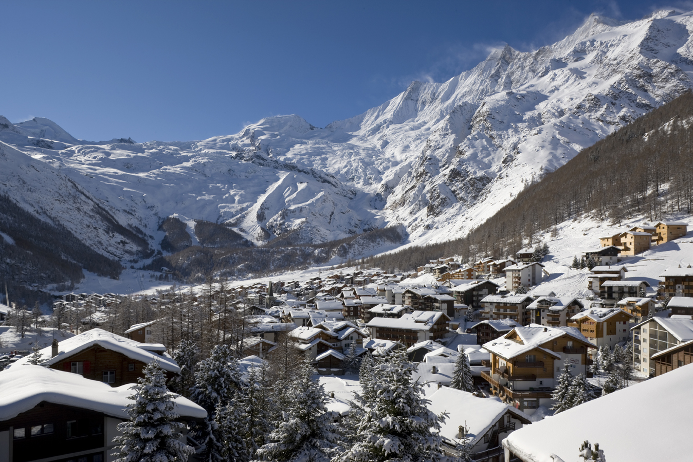 Blick über Saas-Fee im Winter, Aufnahmedatum Januar 2009